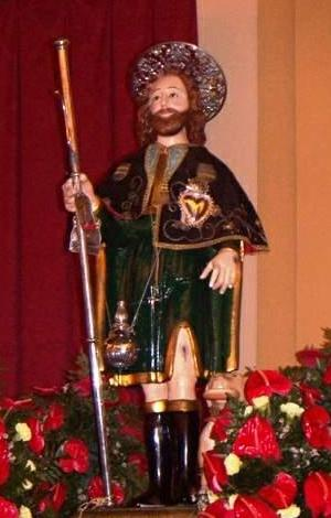 Curti, chiesa di San Michele Arcangelo, la statua di San Rocco